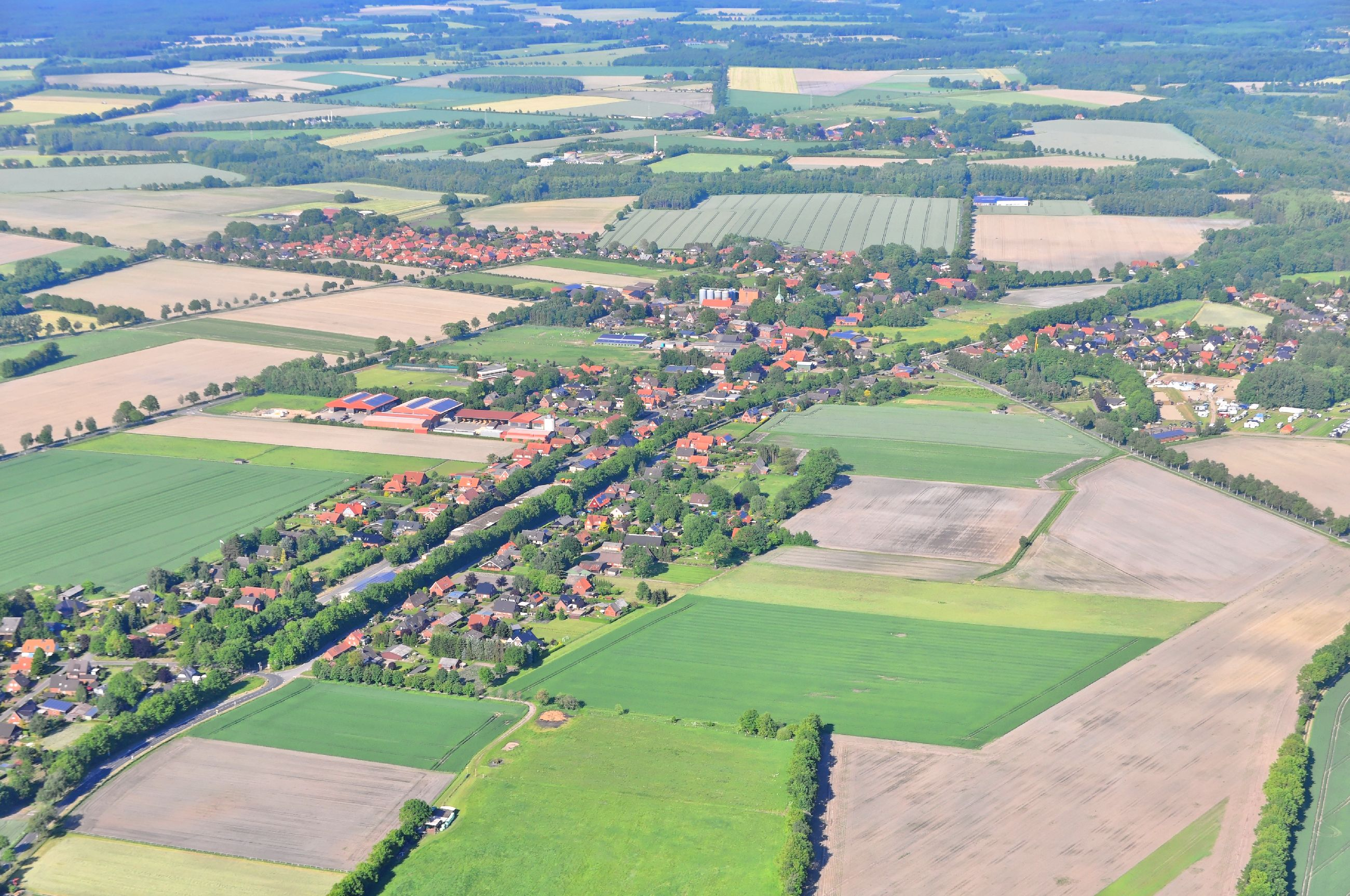 Überführungsflug vom Flugplatz Nordholz-Spieka über Lüneburg, Potsdam zum Flugplatz Schwarzheide-Schipkau